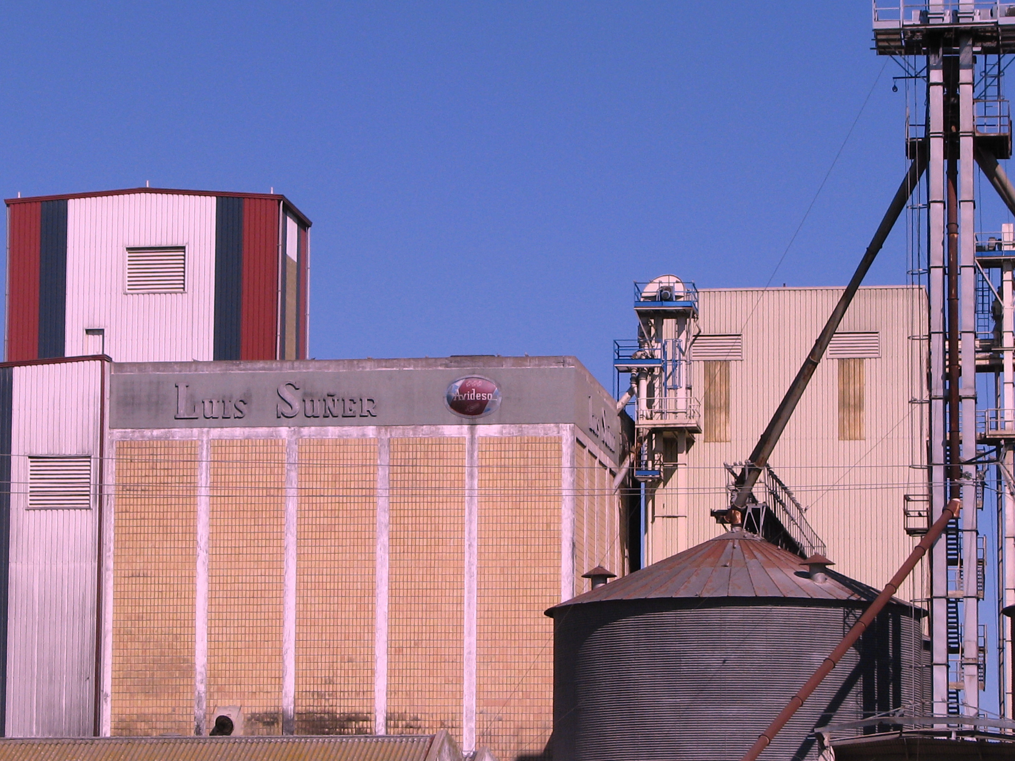 Instalaciones industriales de Avidesa, en Alcira.